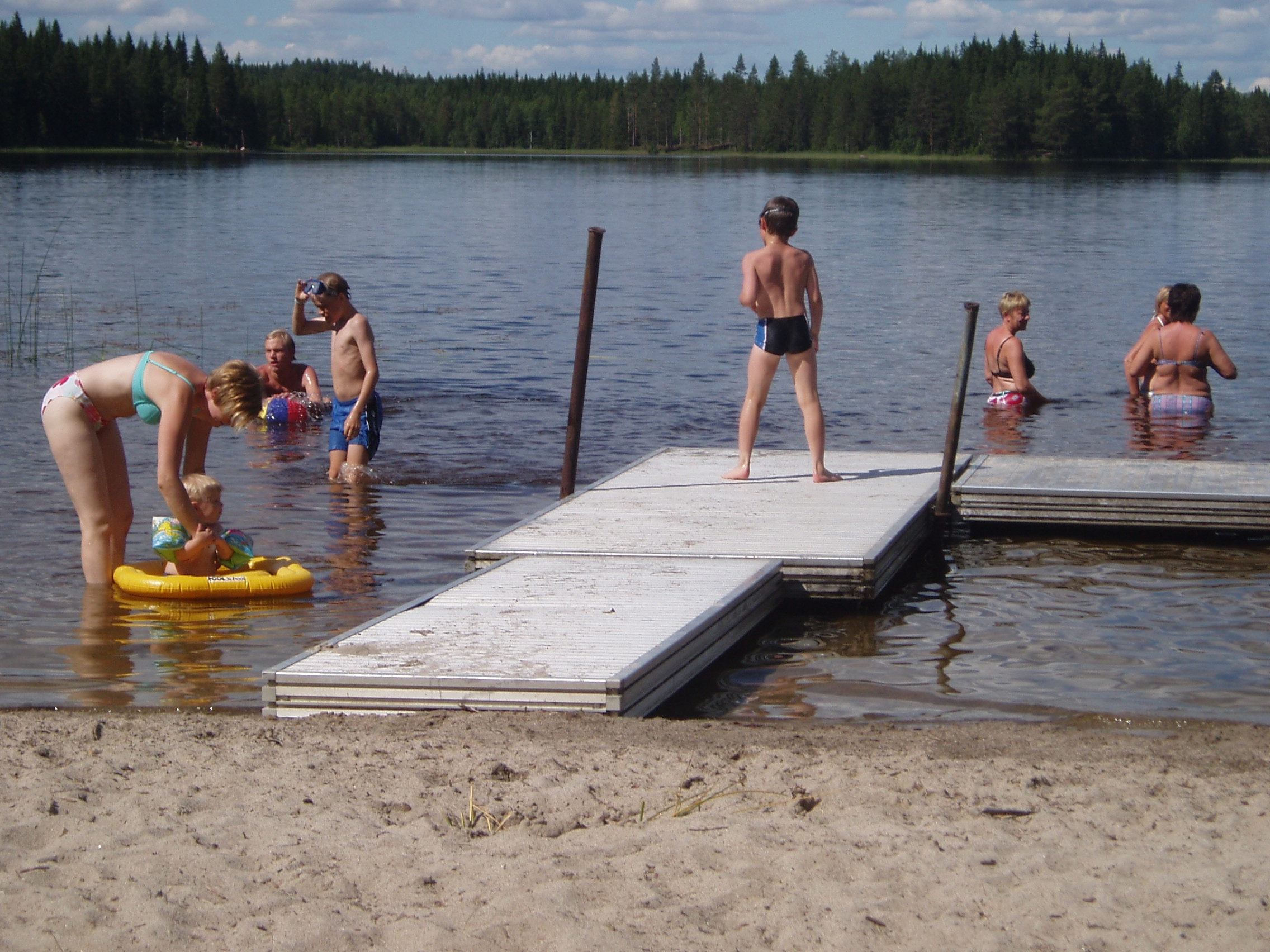 Röjesjöns badplats 2005, Ljustorp